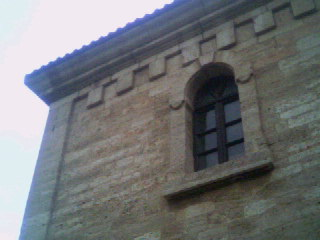 Sabla st Karalampi church